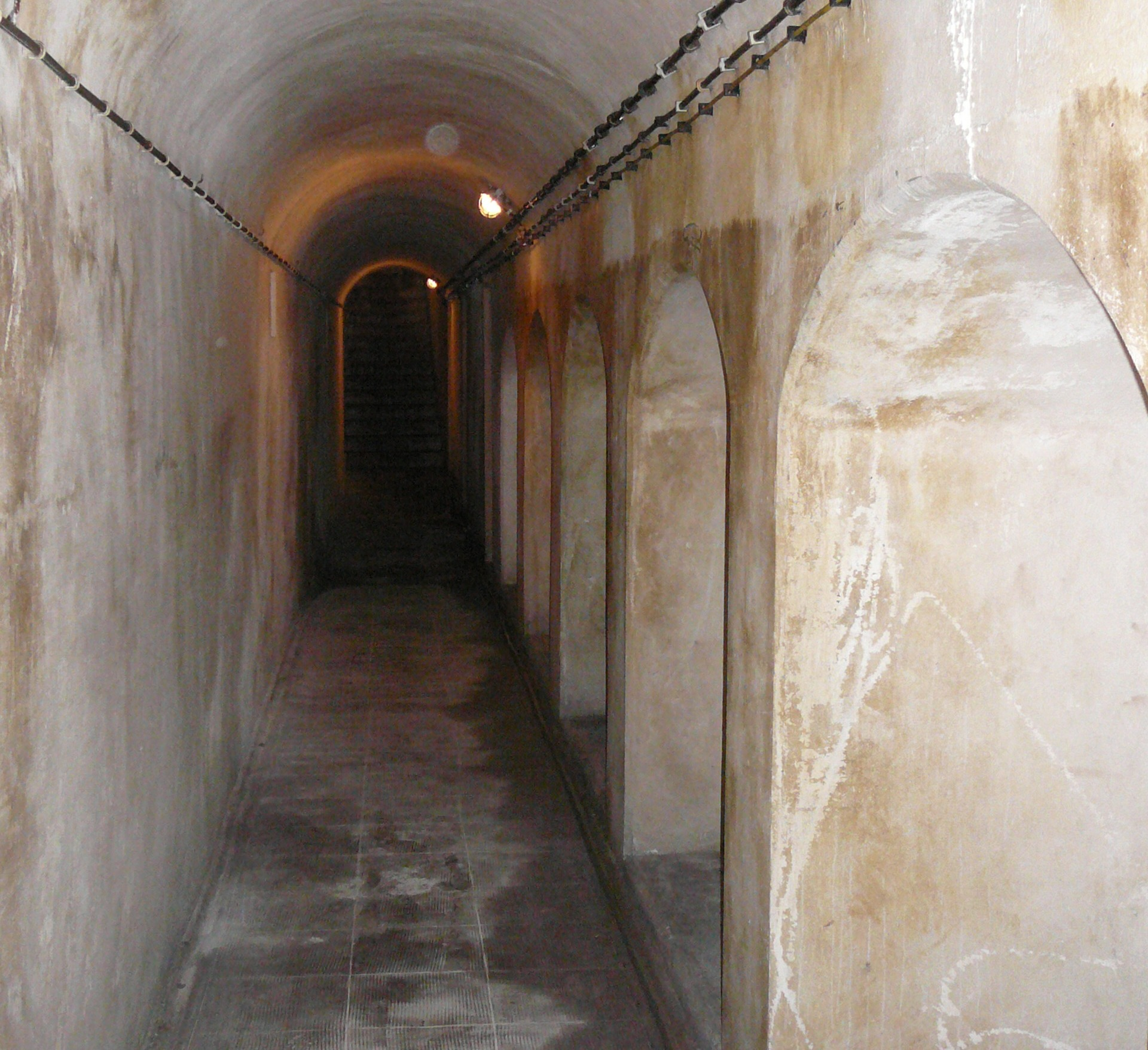 Corridoio interno dell'opera 3, sbarramento di Fortezza